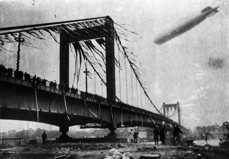 Die neue Riesenbrücke Köln-Mülheim, die grösste Hängebrücke Europas und 32. Brücke über den Rheinstrom, ist am 13.10. in Gegenwart einer riesigen Zuschauermenge feierlich eingeweiht worden. Die mittlere Spannweite dieser Kabel-Hängebrücke beträgt 315 m, an die sich zu beiden Seiten noch Öffnungen von je 91 Meter anschliessen. Gesamtlänge ca. 1300 m. An Material wurden 15.000 Tonnen Stahl und 21.000 Kubikmeter Beton und Eisenbeton verwendet. UBz: zwei Meisterwerke deutscher Technik: Das Luftschiff "Graf Zeppelin", auf seiner Rheinfahrt begriffen, entbietet der neuen Brücke und der zur Weihe versammelten Menge seinen Gruss.